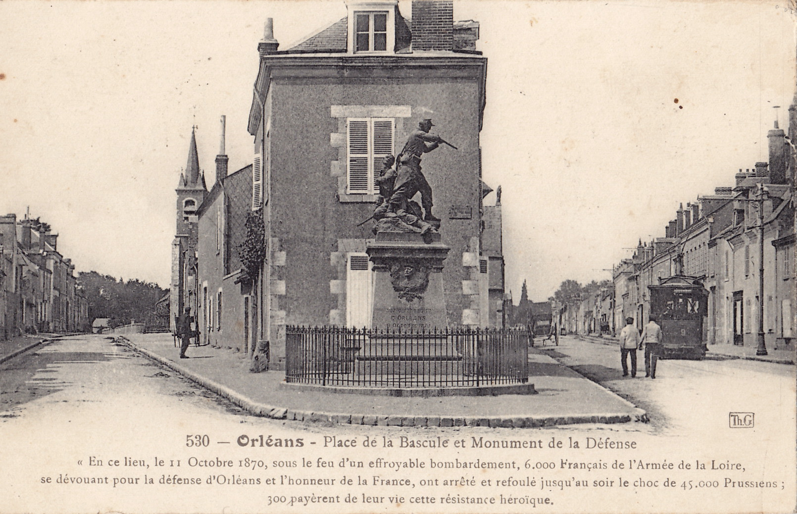 Carte postale ancienne éditée par ThG, n°530 : ORLEANS Place de la Bascule et Monument de la Défense :"En ce lieu, sous le feu d'un effroyable bombardement, 6000 français de l'Armée de la Loire, se dévouant pour la défense d'Orléans et l'Honneur de la France, ont arrêté et refoulé jusqu'au soir le choc de 45.000 Prussiens : 300 payèrent de leur vie cette résistance héroïque".